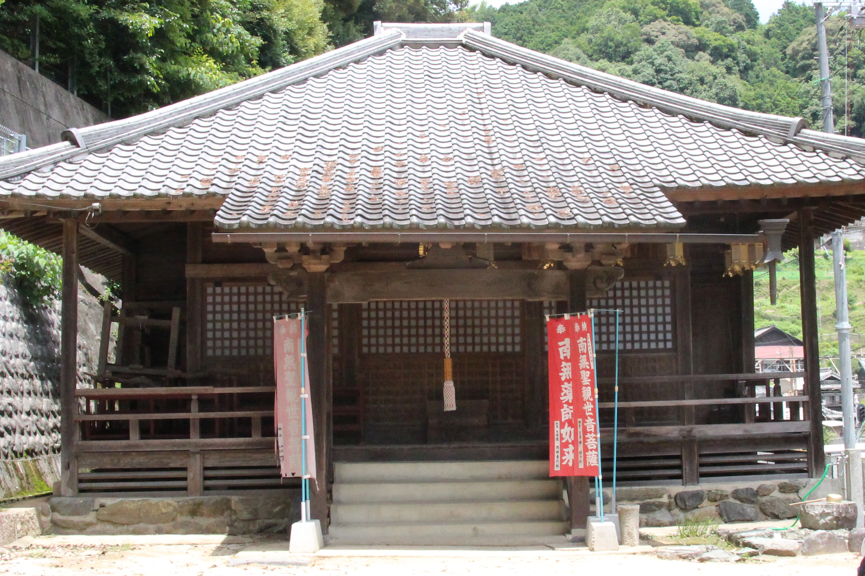 地蔵寺薬師堂